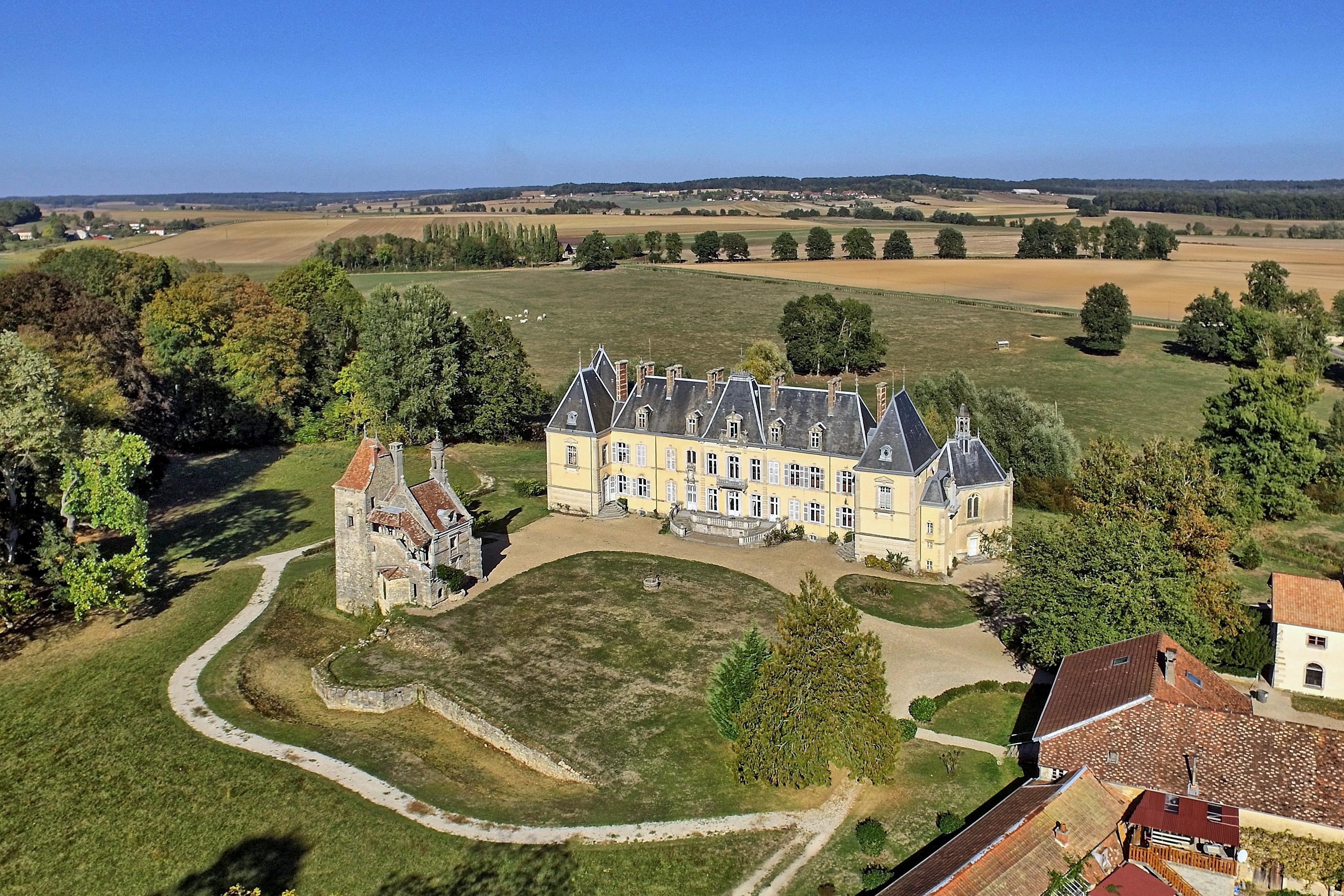 Le château et son parc .